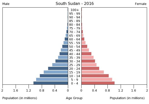 A population pyramid illustrates the age and sex structure of a country's population and may provide insights about political and social stability, as well as economic development. The population is distributed along the horizontal axis, with males shown on the left and females on the right. The male and female populations are broken down into 5-year age groups represented as horizontal bars along the vertical axis, with the youngest age groups at the bottom and the oldest at the top. The shape of the population pyramid gradually evolves over time based on fertility, mortality, and international migration trends.